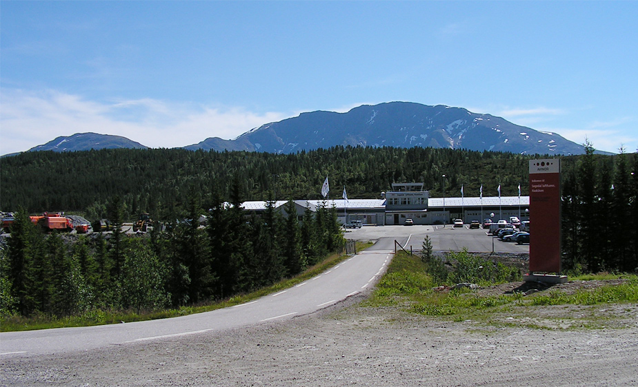 Sogndal Lufthamn